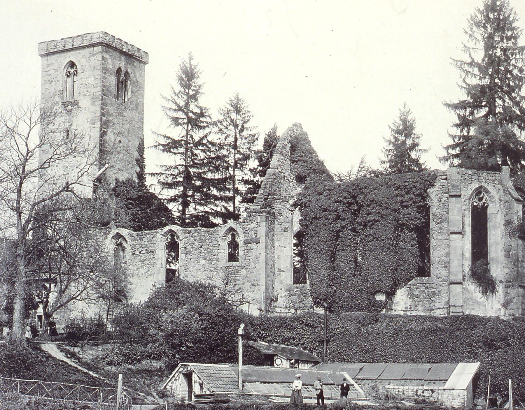 Ancienne abbaye de Truttenhausen à Obernai (Bas-Rhin, Alsace, France).